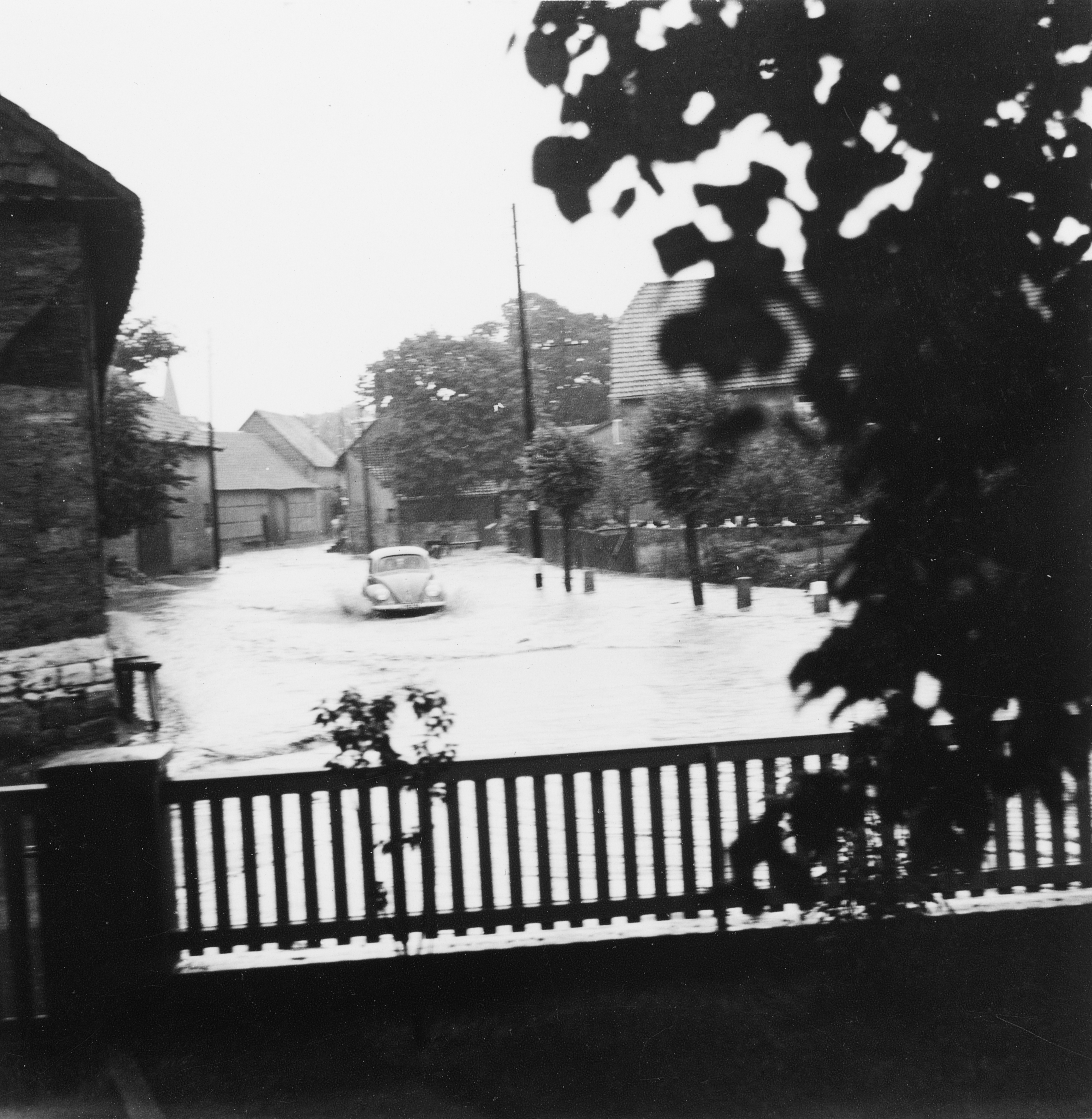 Die Lauinger Mühlenriede ist über ihre Ufer getreten und hat die Kornstraße überflutet. Der Standpunkt des Fotografen ist an der Kornstraße Ecke Brückentor.